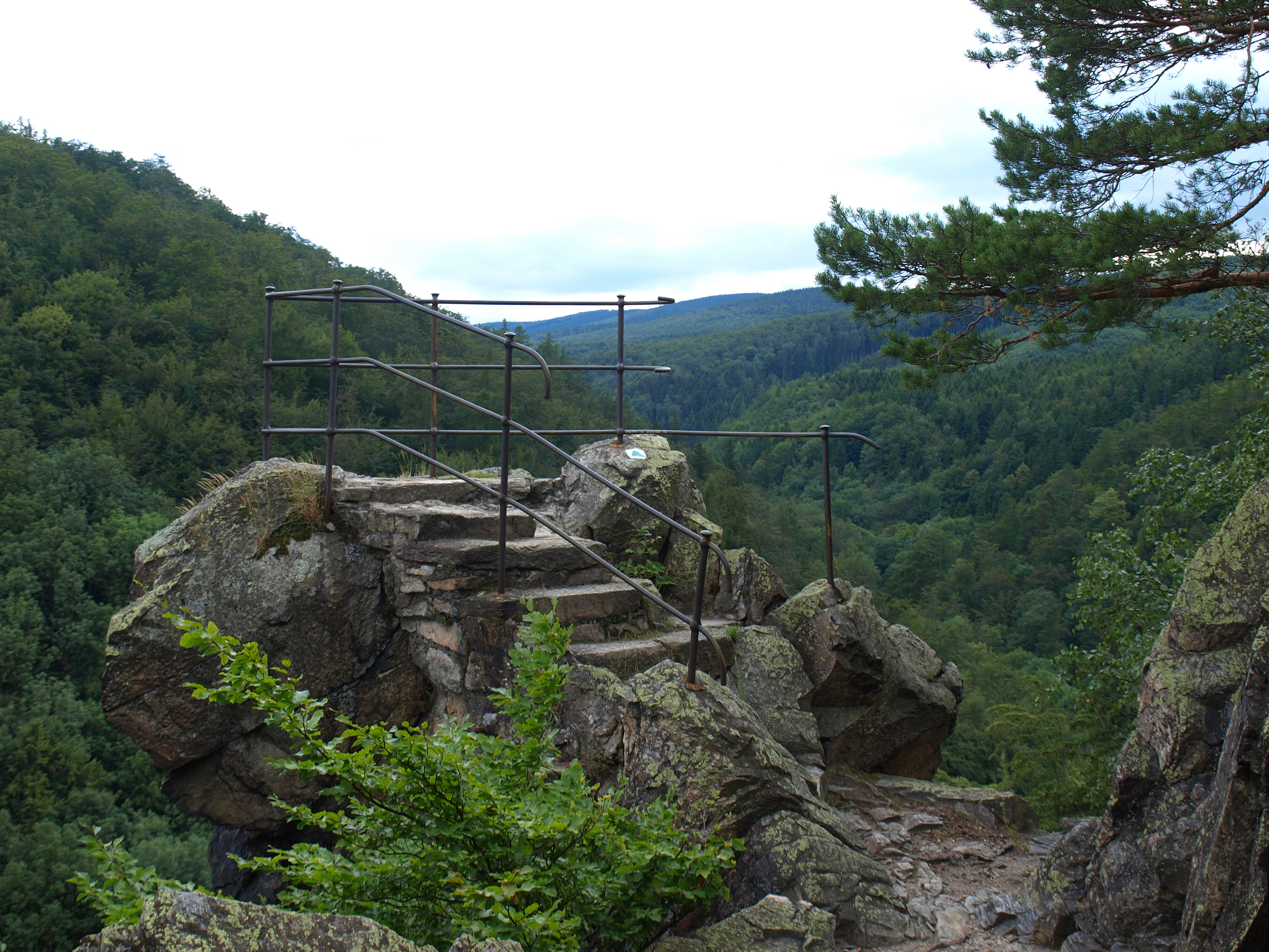 Vyhlídka Čertovy kazatelny v PR Račí Údolí.